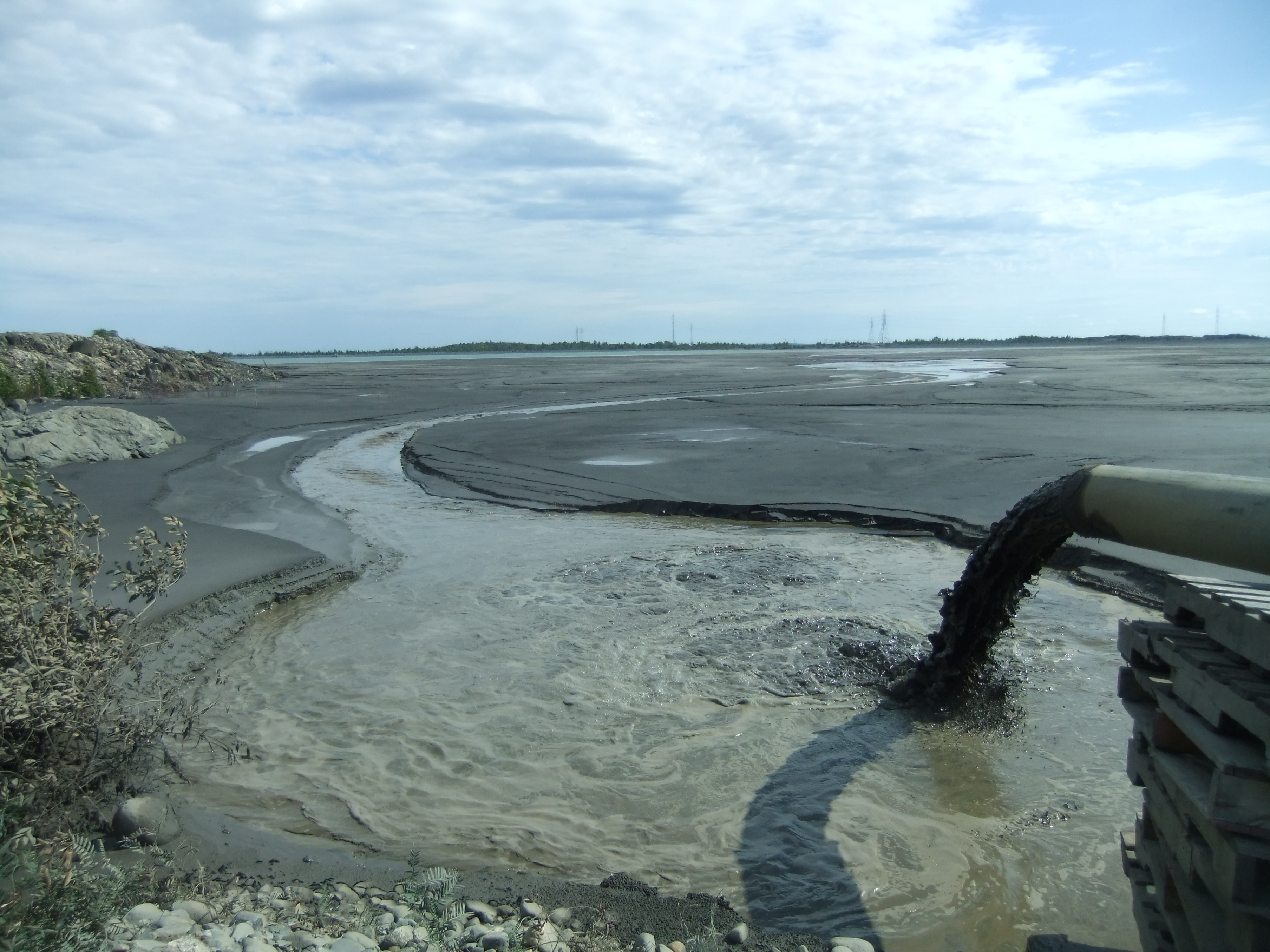 Parc à résidus de la Fonderie Horne à Rouyn-Noranda.